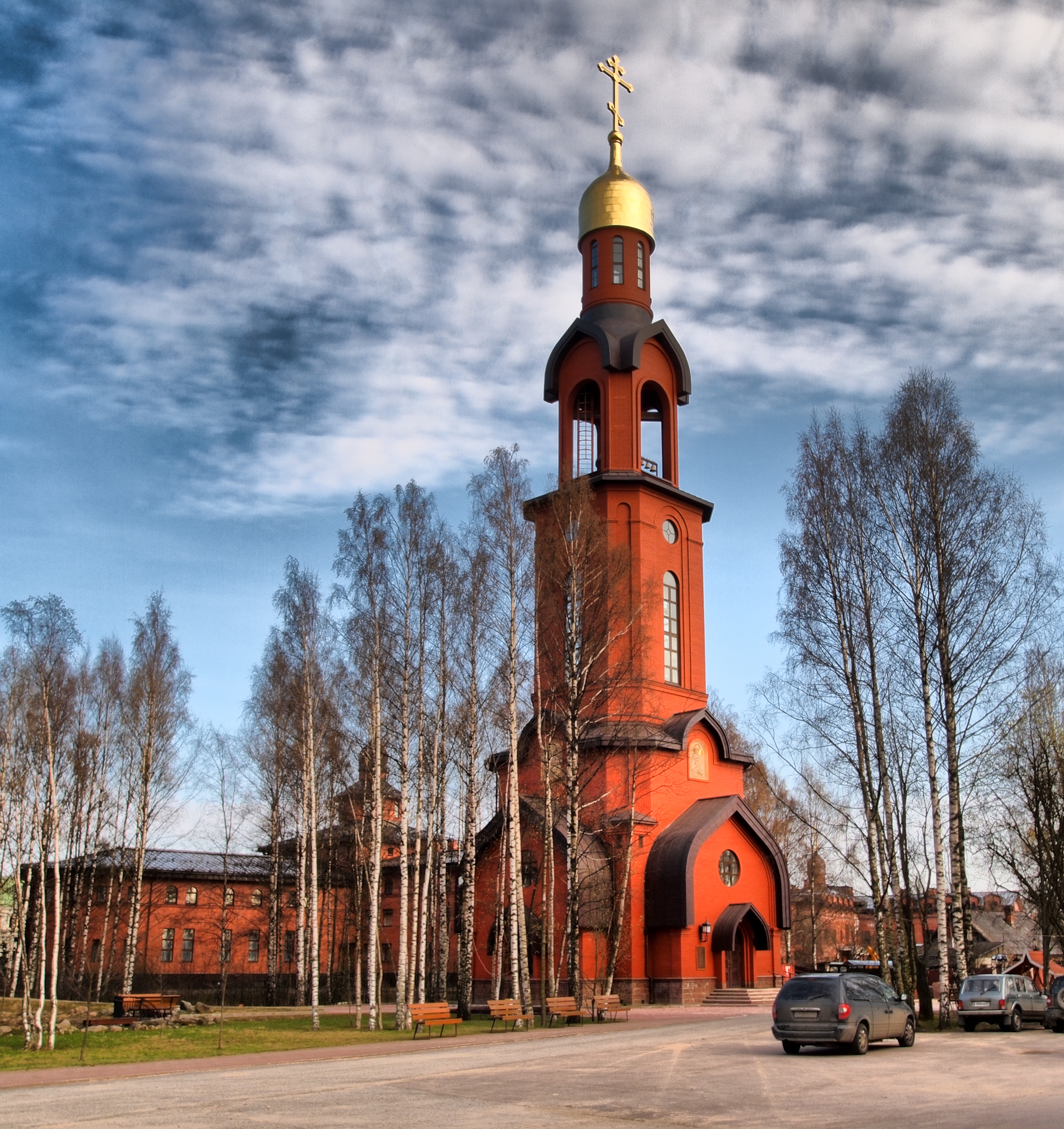 Храм-колокольня Святого Благоверного великого князя Игоря Черниговского